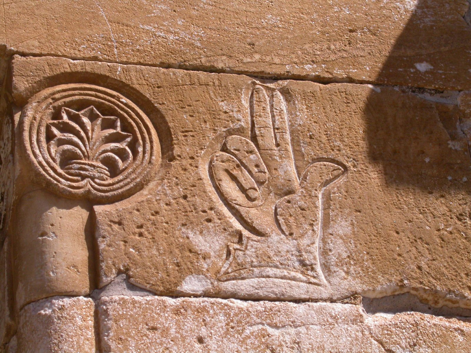 Llinda 1019-1020